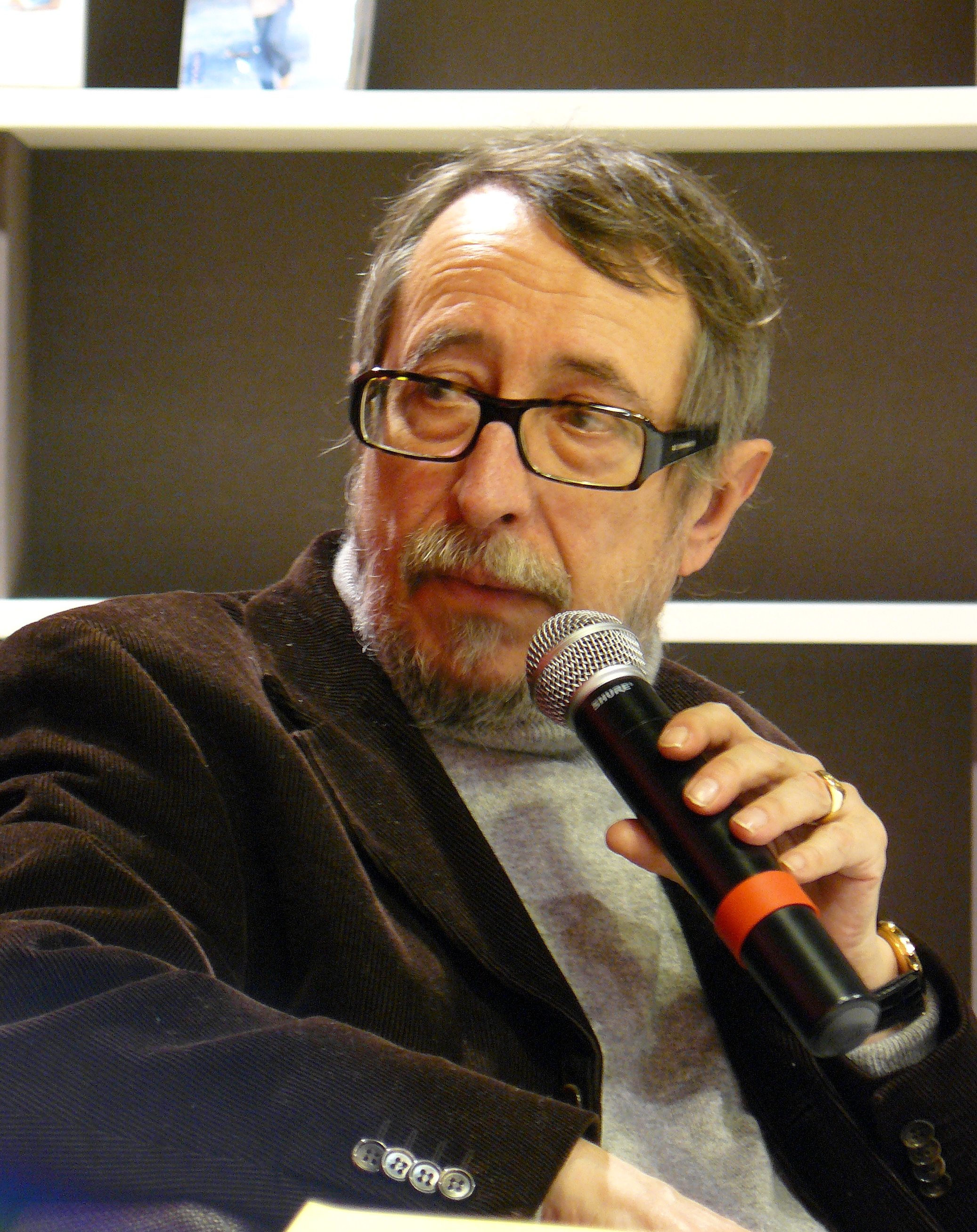 Patrick Rambaud, le 23 février 2010 à la FNAC Montparnasse, lors de la présentation de son livre "Troisième chronique du règne de Nicolas Ier".